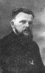 Josef Koutný (1909-1951), český katolický kněz, teolog rektor Cyrilometodějské smírné kaple na hoře Olivetské